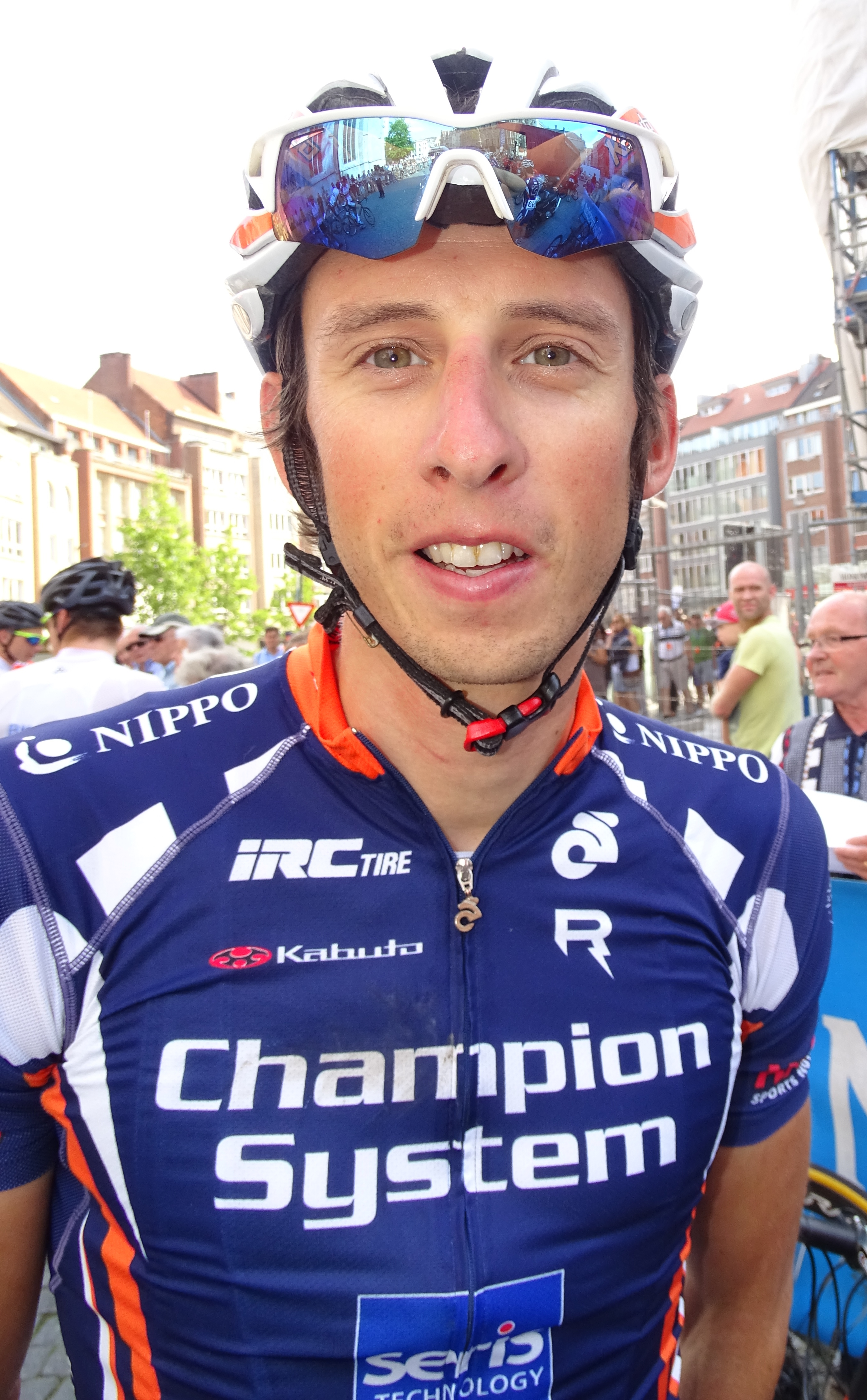 Reportage réalisé le dimanche 23 août à l'occasion du départ et de l'arrivée du Grand Prix Jef Scherens 2015 à Louvain, Belgique.